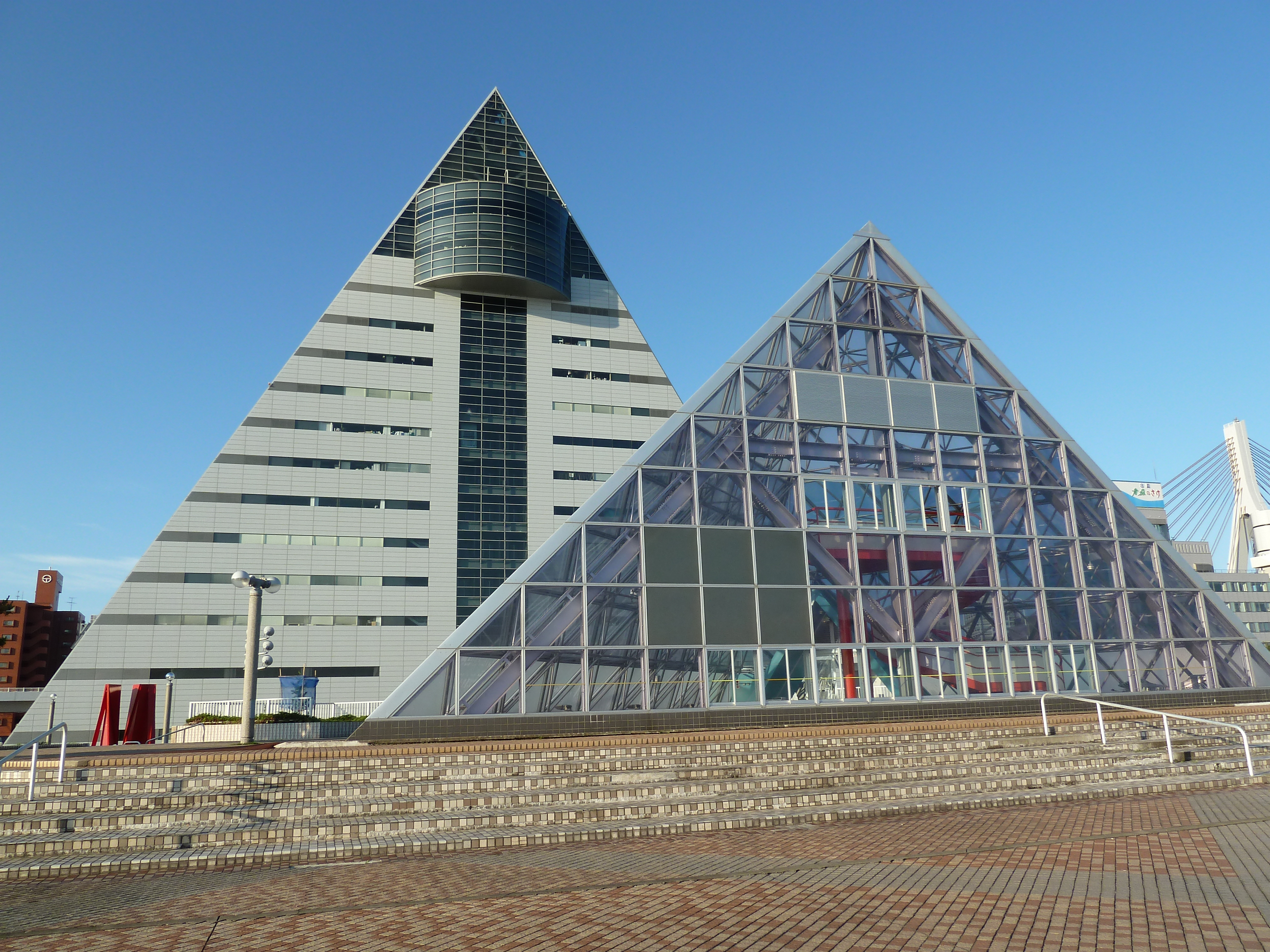 アスパムと小アスパム